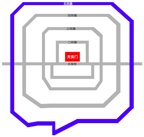 北京市五环路略图，CNDF08在2004年画的图片